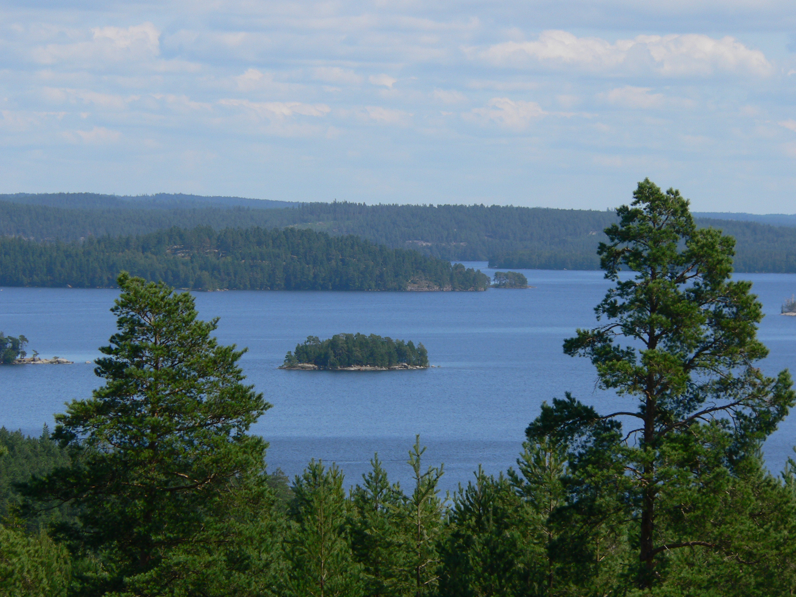 See Sommen von der Insel Torpön aus gesehen